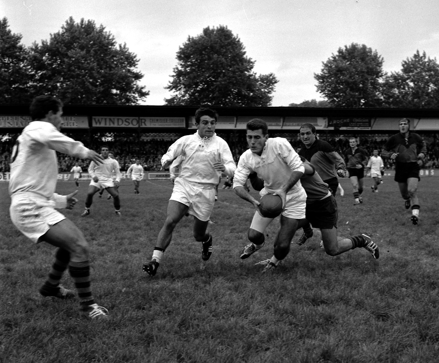 Stade Ernest Wallon. Le 14 Octobre 1962. Vue de la rencontre entre le Stade Toulousain et Bayonne.